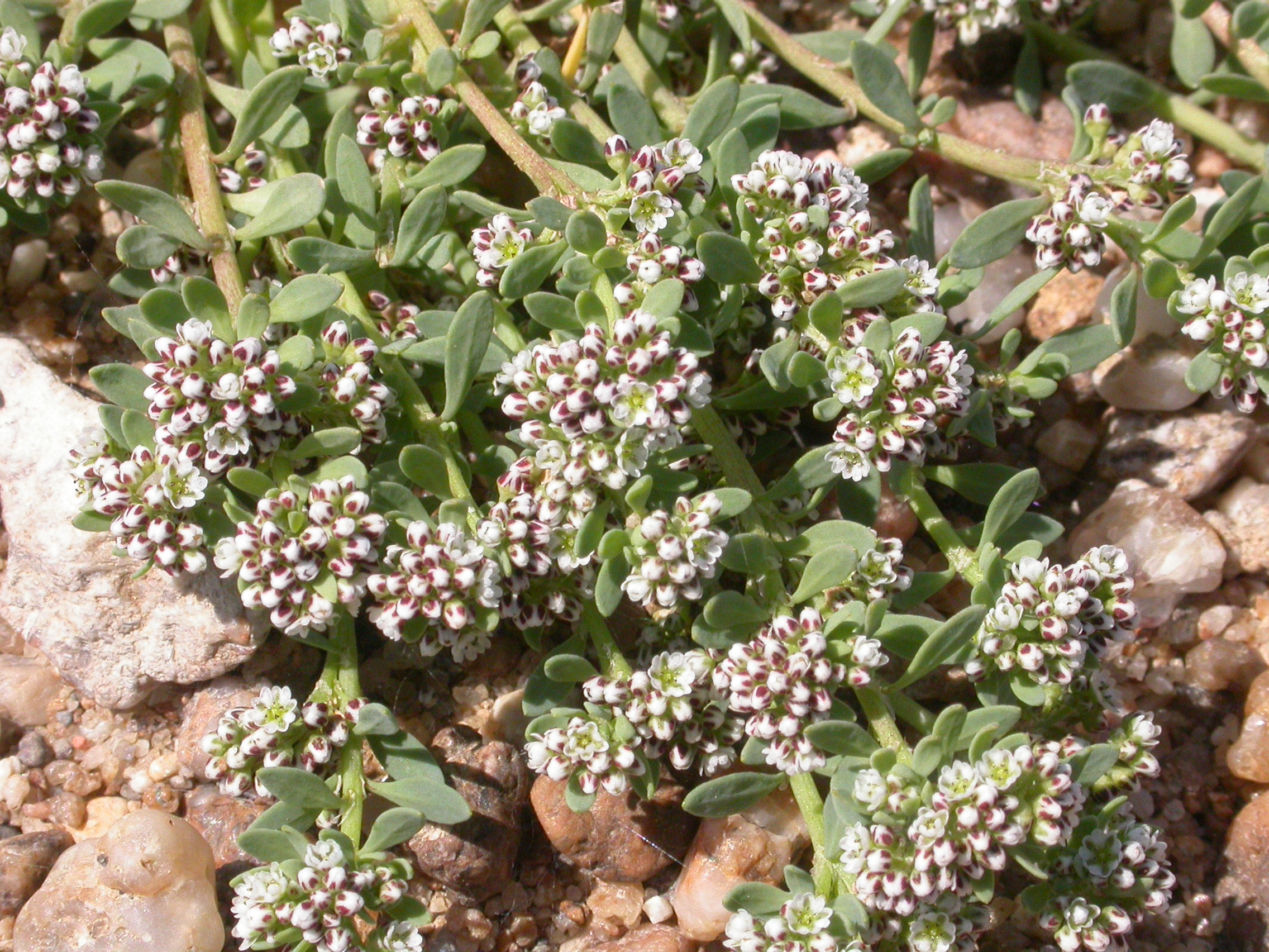 Corrigiola litoralis Saint-Mathurin-sur-Loire ( Maine-et-Loire), France